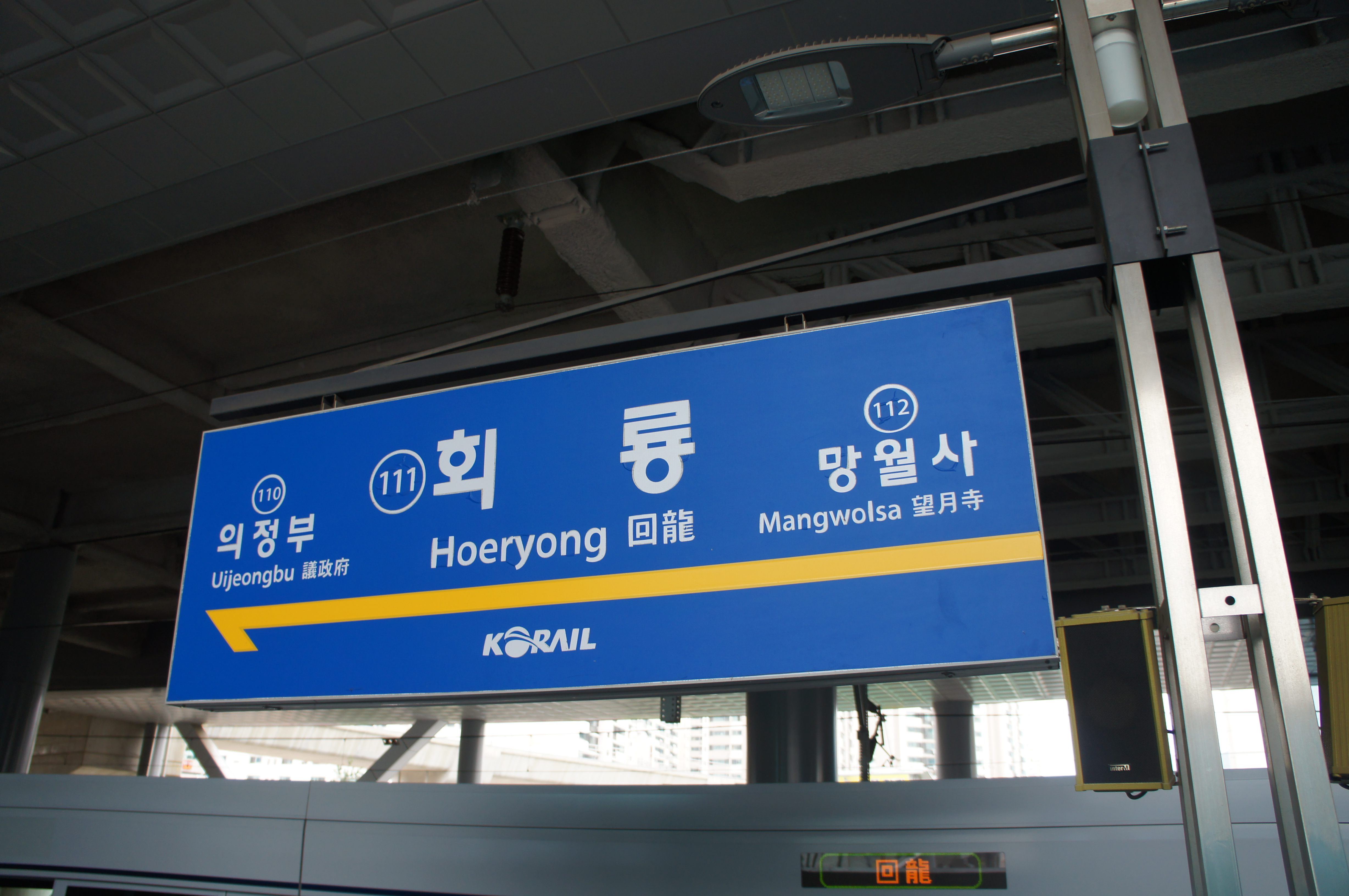 회룡역 역명판